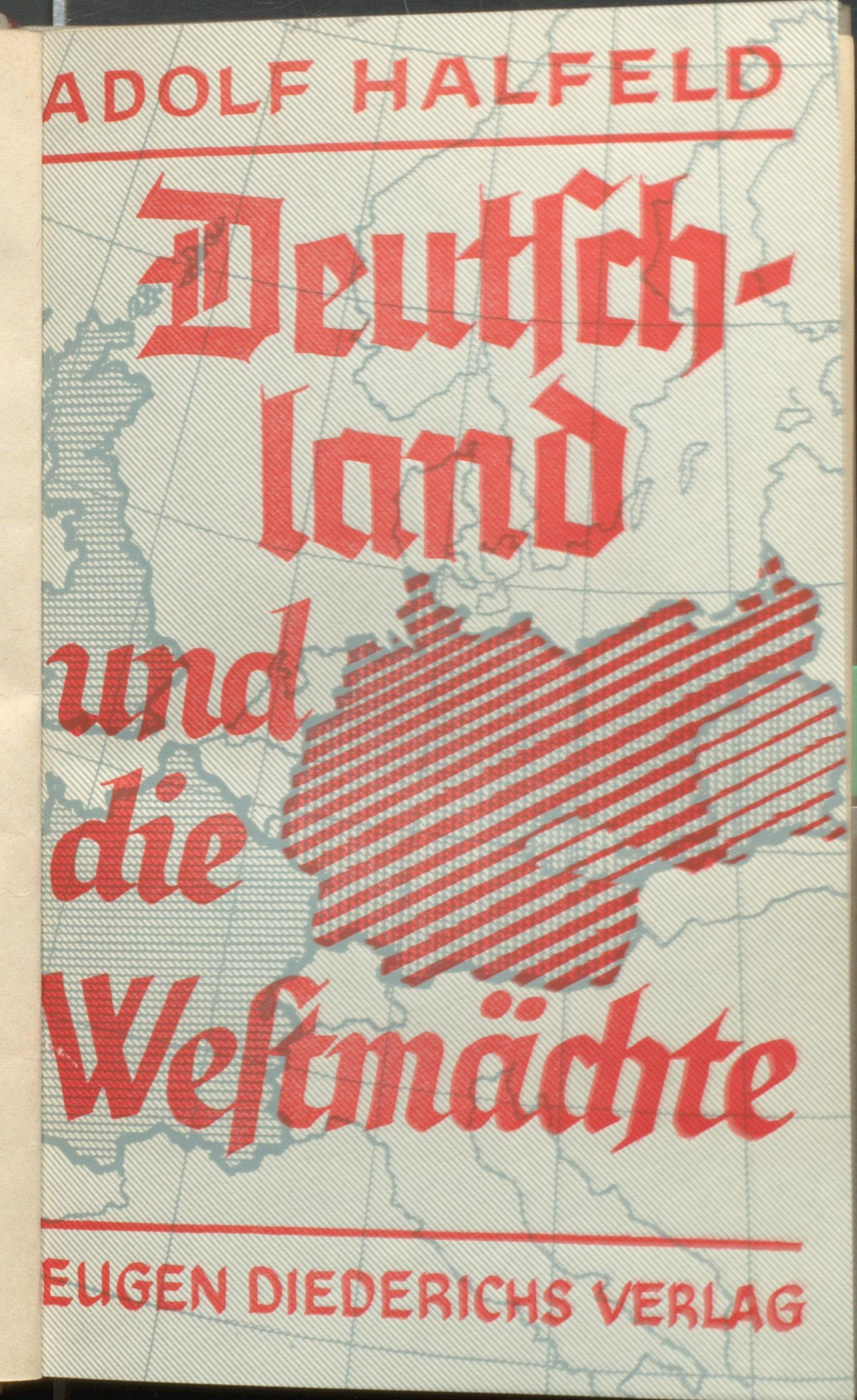 Adolf Halfeld Deutschland und die Westmächte. Jena : Diederichs, 1940 Titel